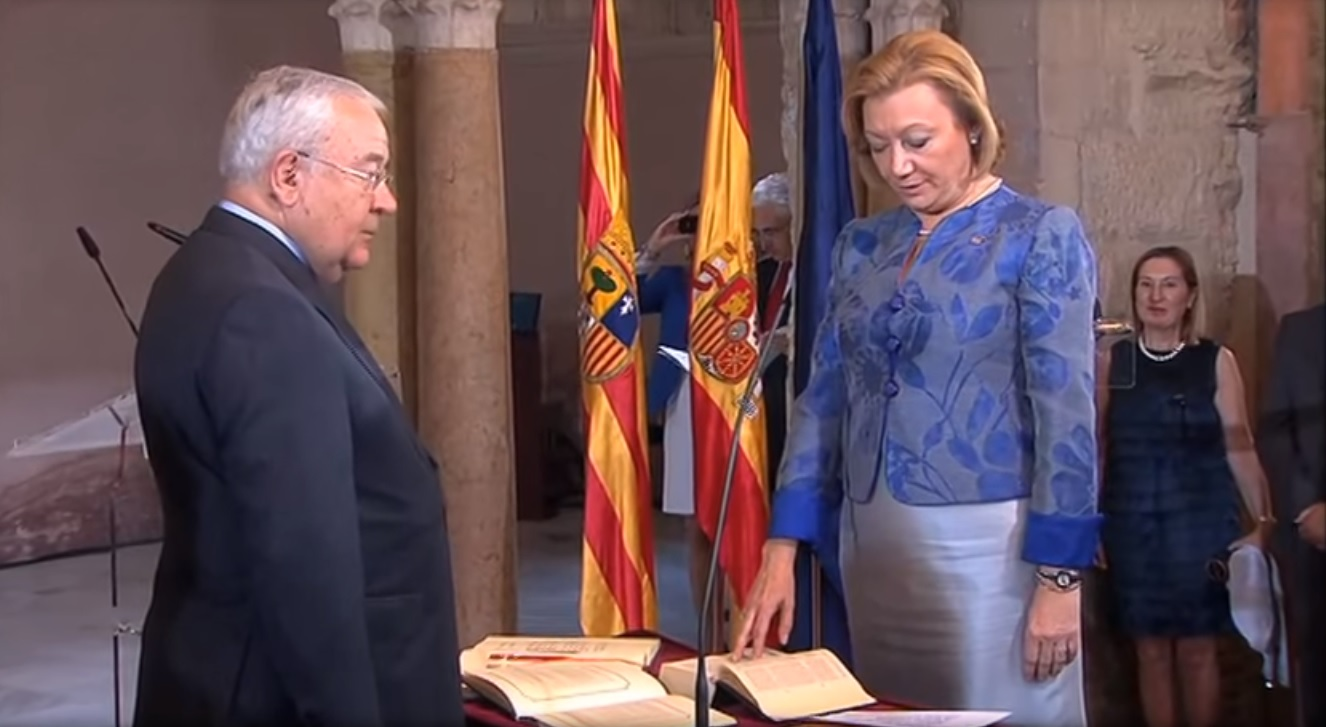 Toma de posesión de Luisa Fernanda Rudi en 2011.